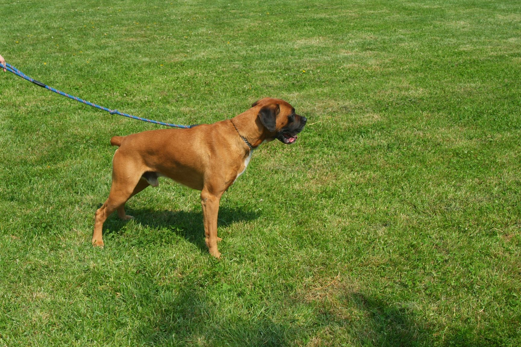 Preparativi pranzo